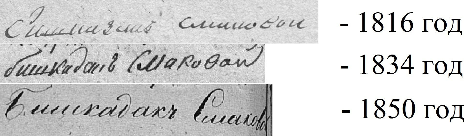 Название деревни по Ревизским сказкам